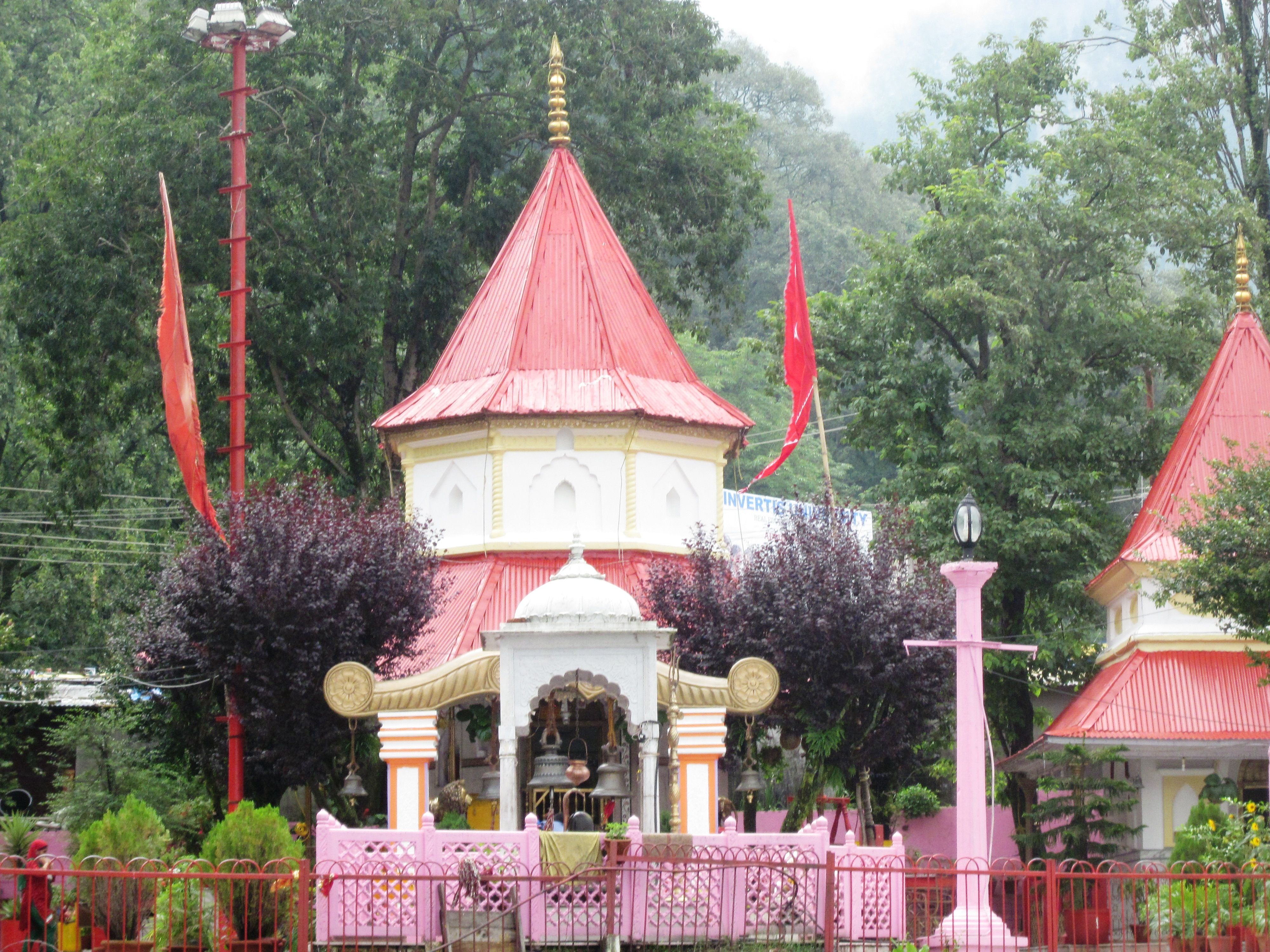 नयना देवी मंदिर नैनीताल